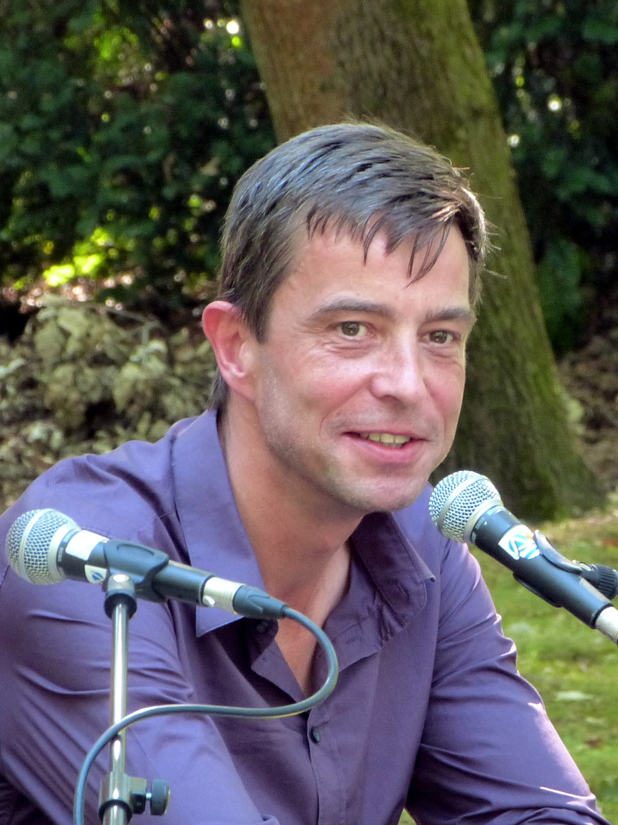 German writer Henning Ahrens at the Erlanger Poetenfest 2015